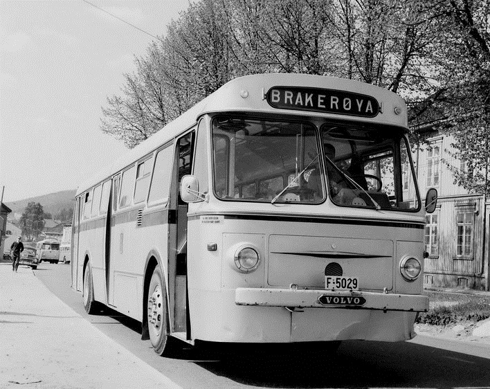 Buss, reg. nr. 5029 til Brakerøya.